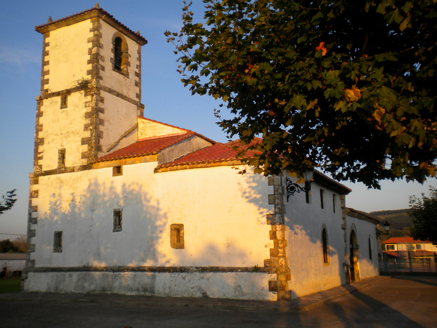 Iglesia de San Salvador, Castenedo (Ribamontán al Mar)